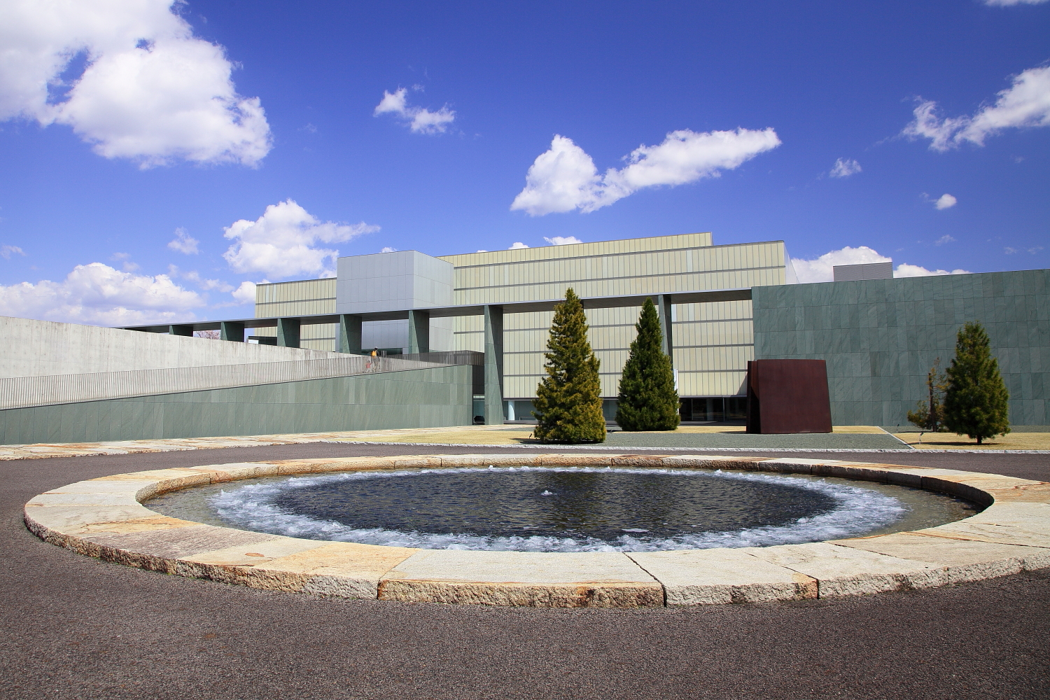 豊田市美術館（豊田市小坂本町、2012年）